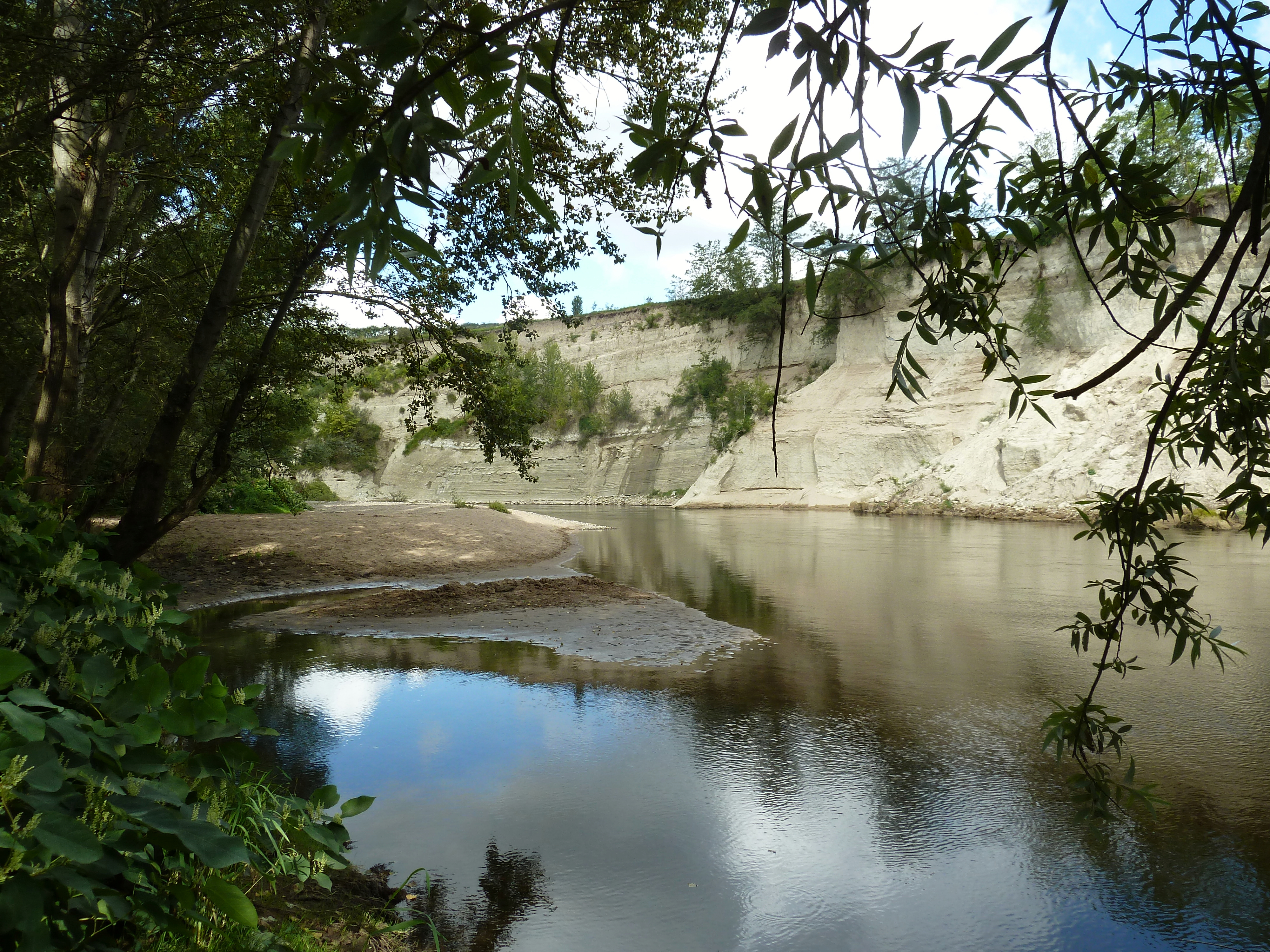 la falaise de Malmouche sur Allier.- à Mezel, Puy-de-Dôme.- (Auvergne).- France.